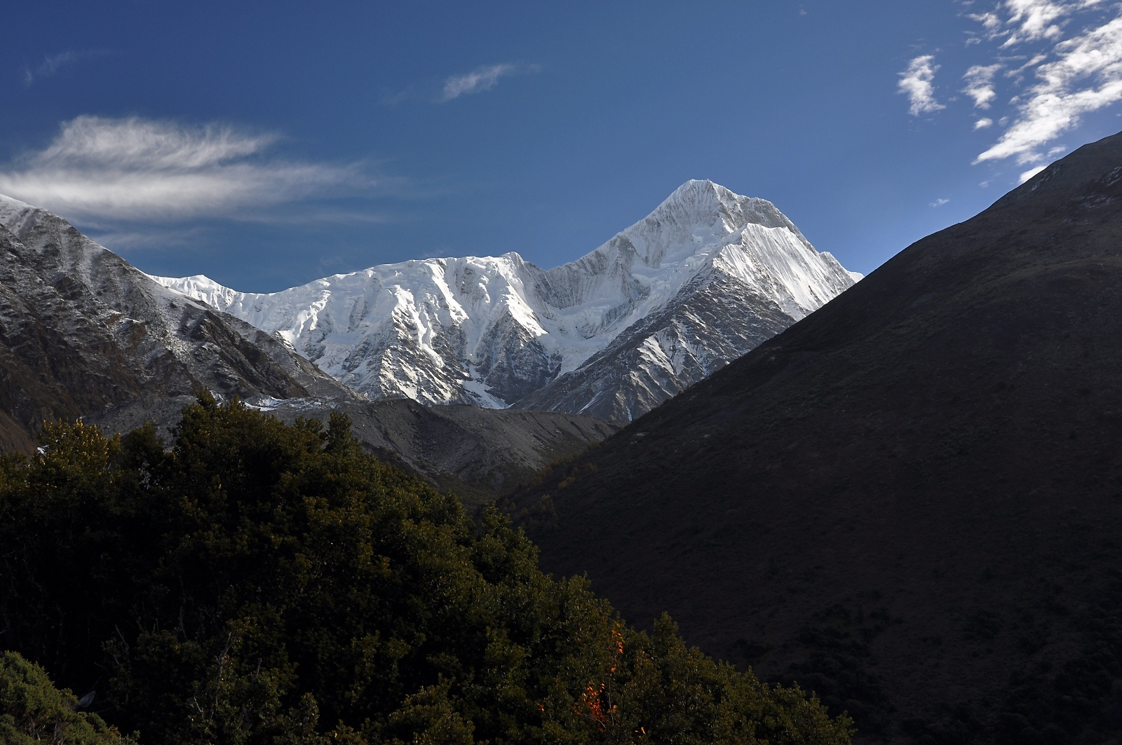 Minya Konka Northwest Ridge